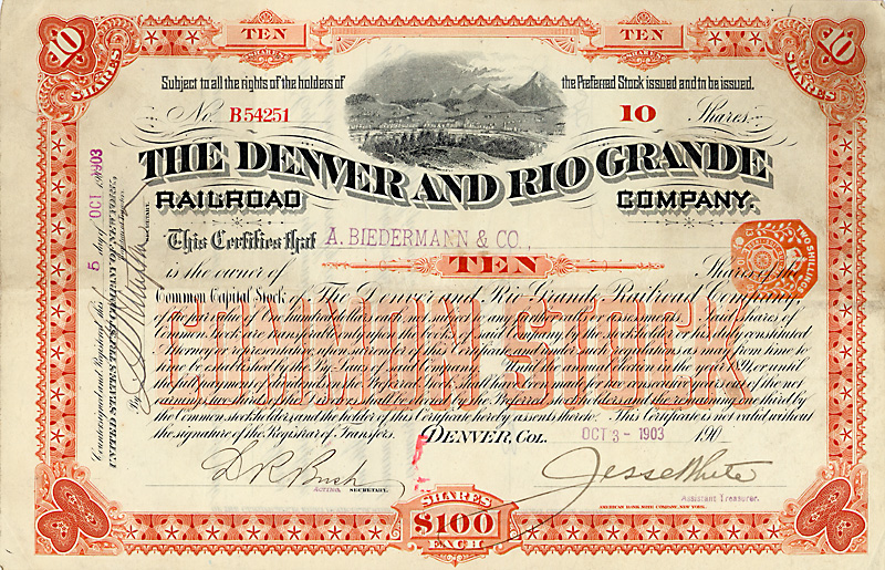 Aktie der Denver and Rio Grande Railroad vom 3. Oktober 1903